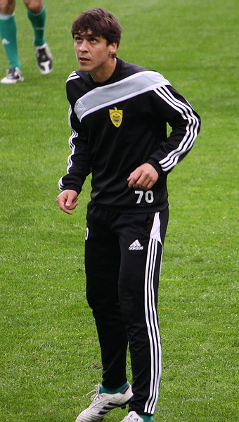 Eldar Mamaev